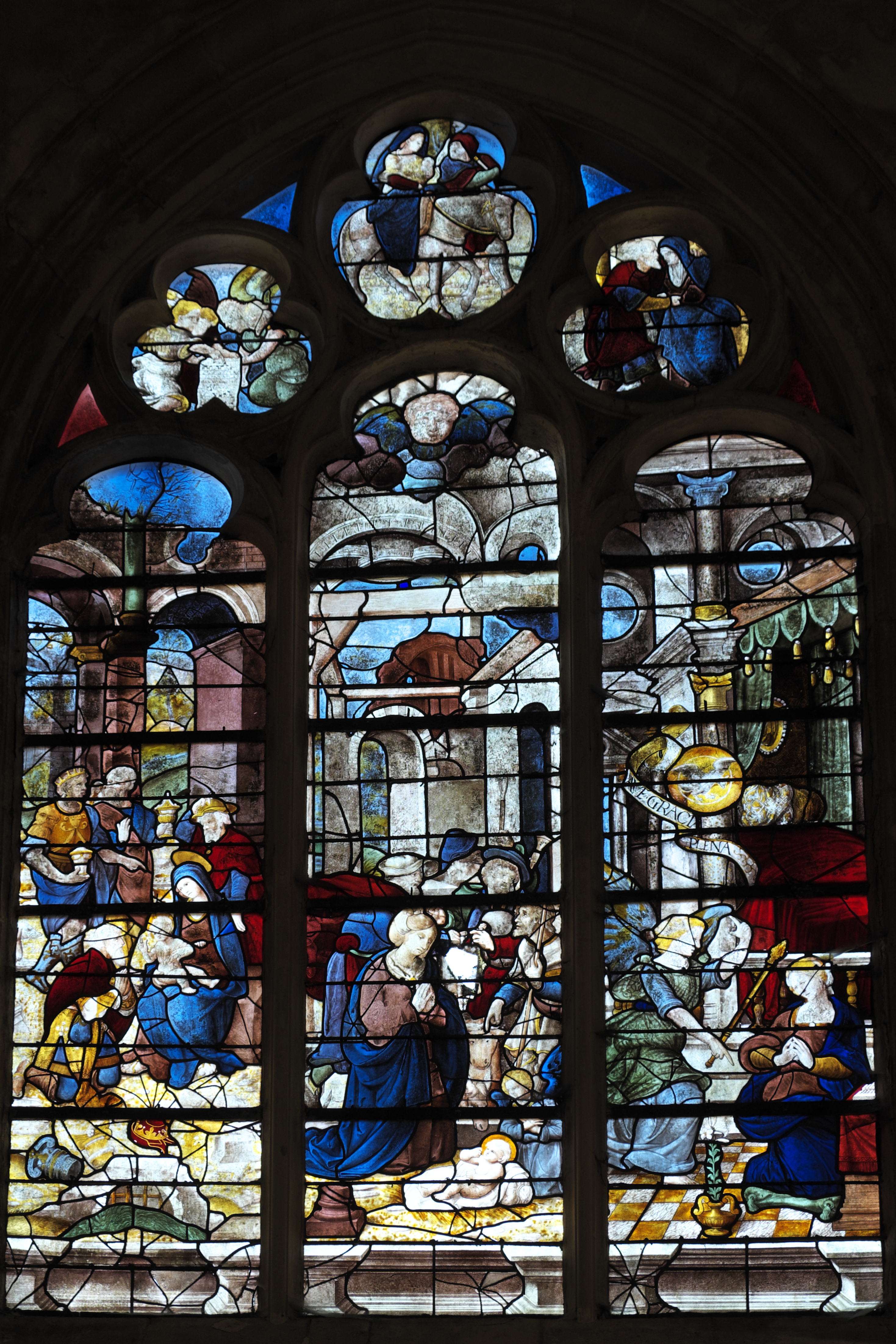 Katholische Pfarrkirche Sainte-Geneviève in Héricy im Département Seine-et-Marne (Île-de-France/Frankreich), Bleiglasfenster aus dem 16. Jahrhundert mit Szenen der Geburt Christi; Darstellung: Anbetung der Heiligen Drei Könige (links), Anbetung der Hirten (Mitte), Verkündigung (rechts); im Maßwerk: Engel (links), Flucht nach Ägypten (Mitte), Anna und Joachim (rechts)